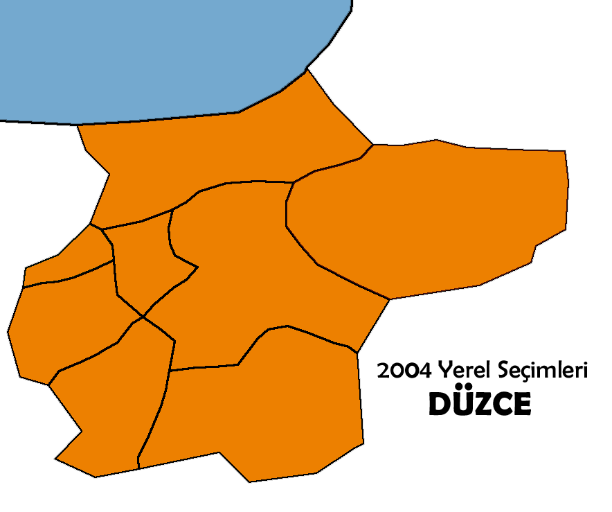 2004 Türkiye yerel seçimleri